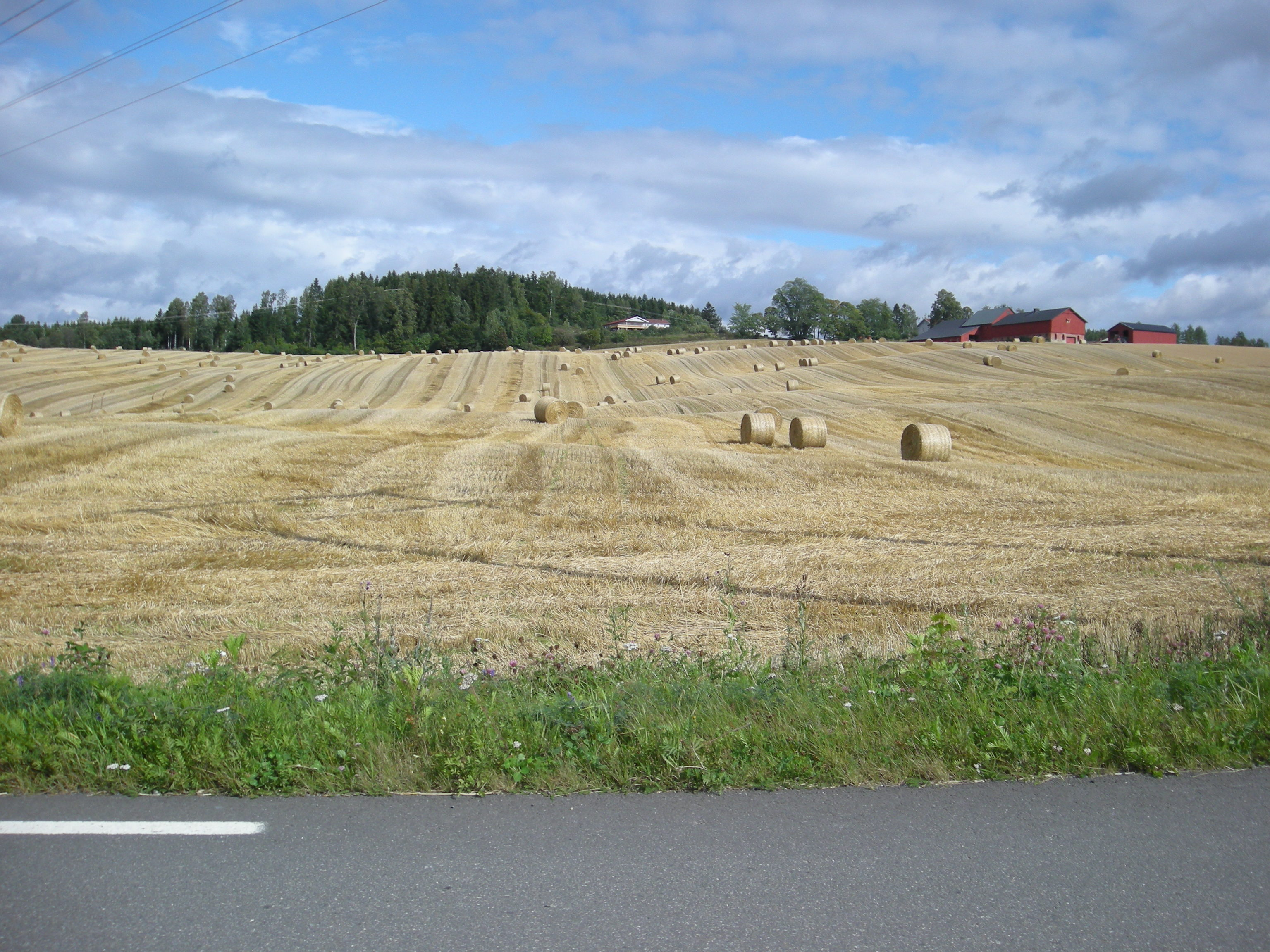 Fylkesvei 1786 (tidl. 95) i Ringsaker